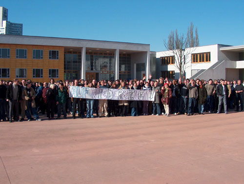 Zum Wechsel des Schulleiters versammeln sich die Schüler auf dem Schulhof.